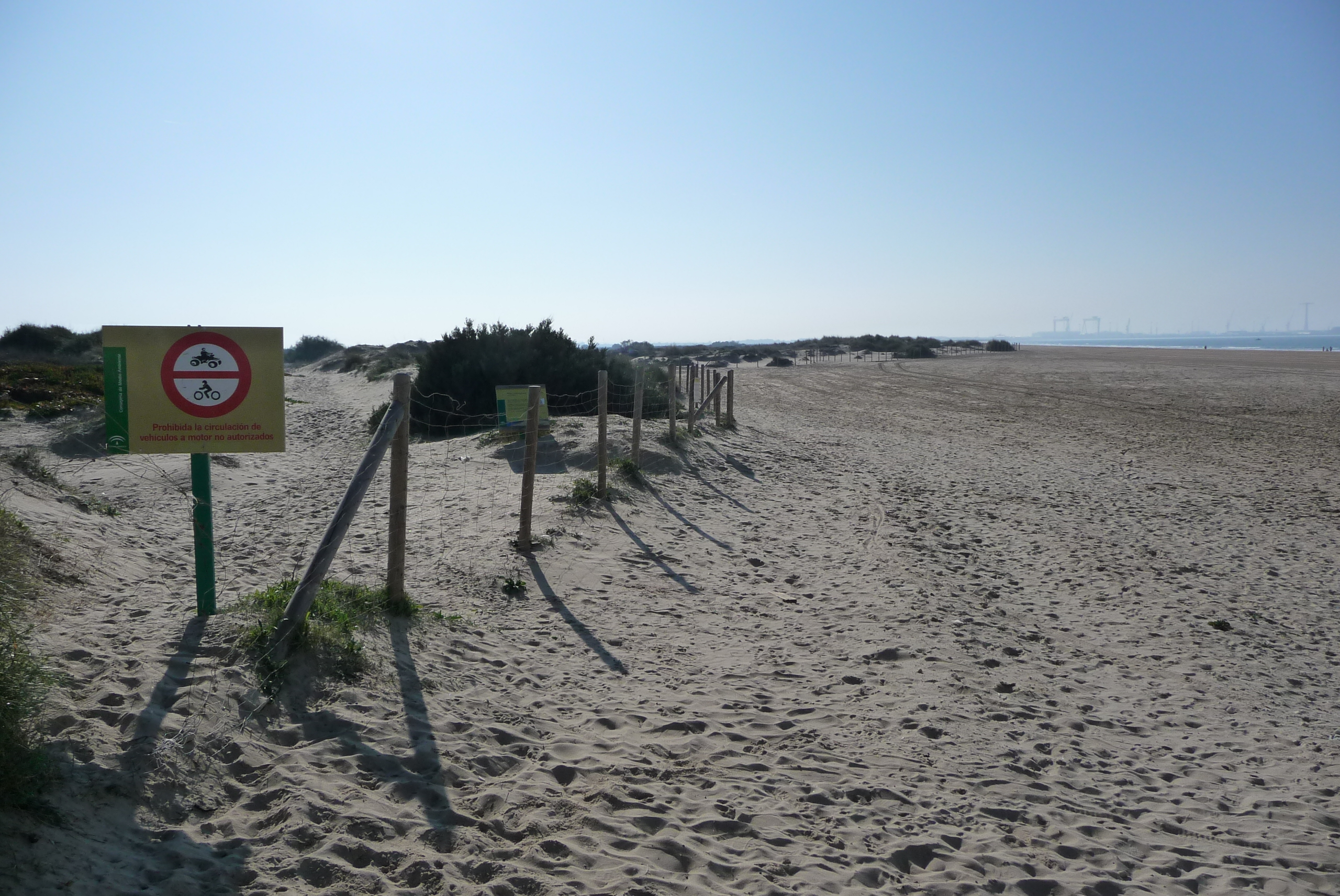 Bahia de Cadiz Natural Park. Valdelagrana beach, El Puerto de Santa Maria. Andalusia, Spain